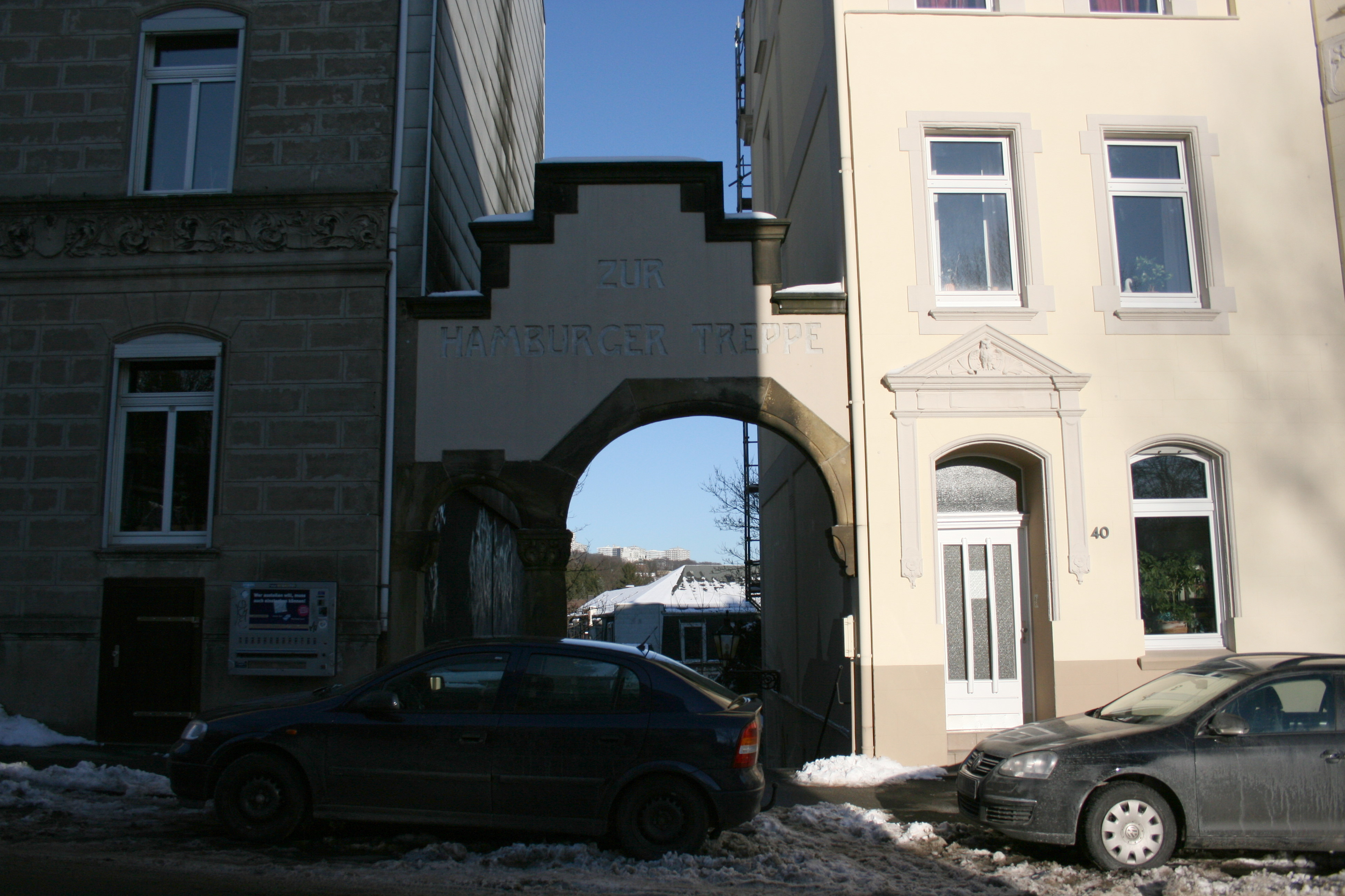 Hamburger Treppe in Wuppertal